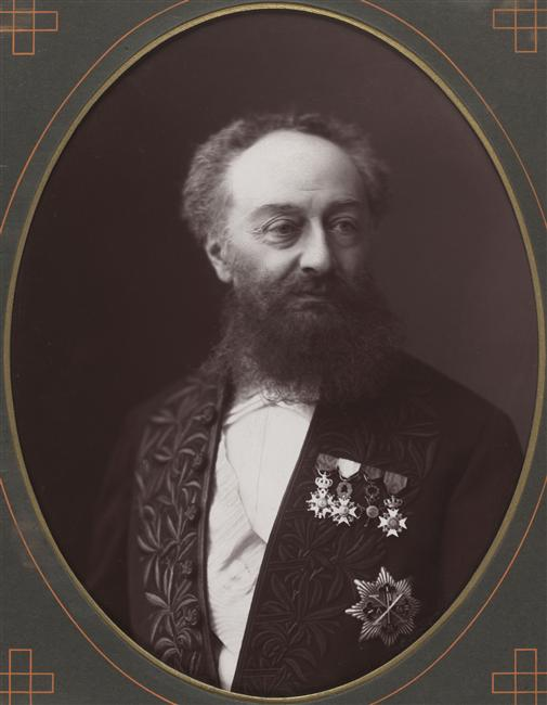 Léon Marie Hervey de Saint-Denis (1823-1892)